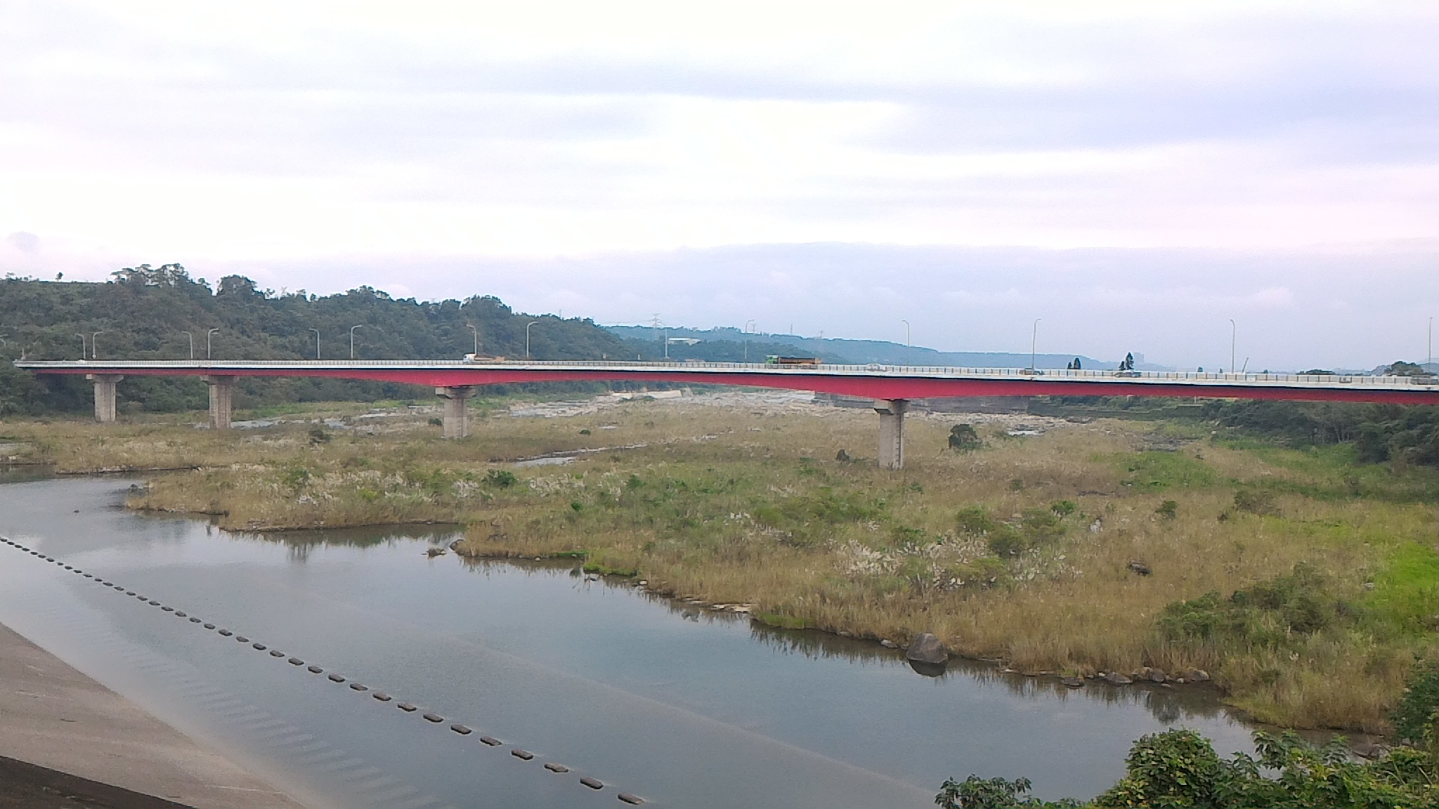 Bân-lâm-gú: 臺灣桃園溪洲大橋，佇石門水庫遐翕的。